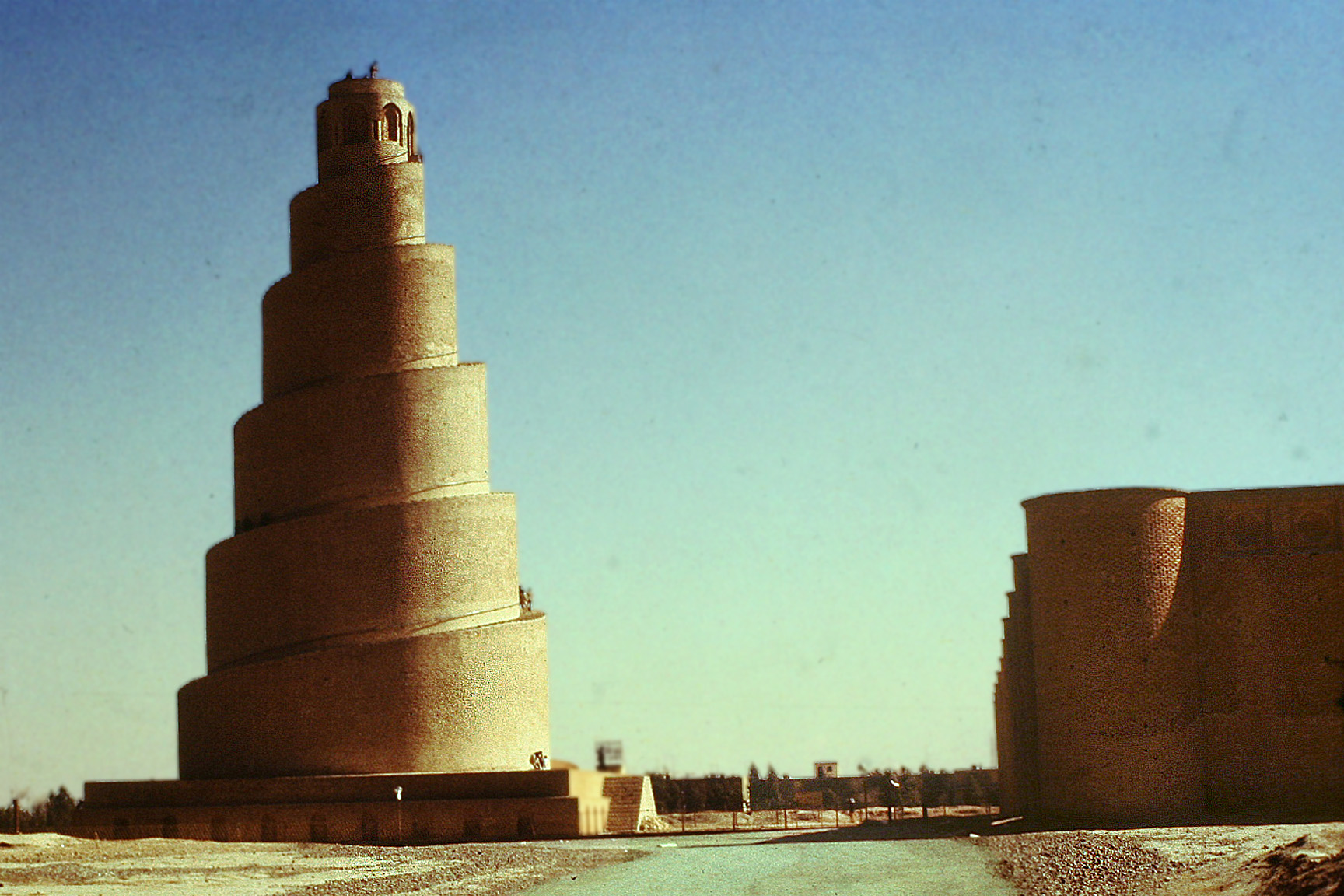 سامراء Samarra-Wielki Meczet ze spiralnym minaretem